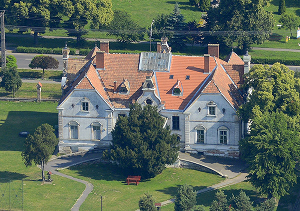 A beledi Barthodeiszky-kastély a levegőből